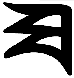 тха